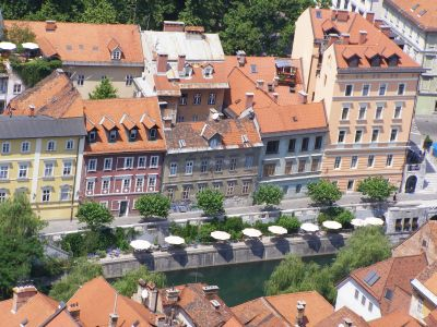 Lublana, Slovenia